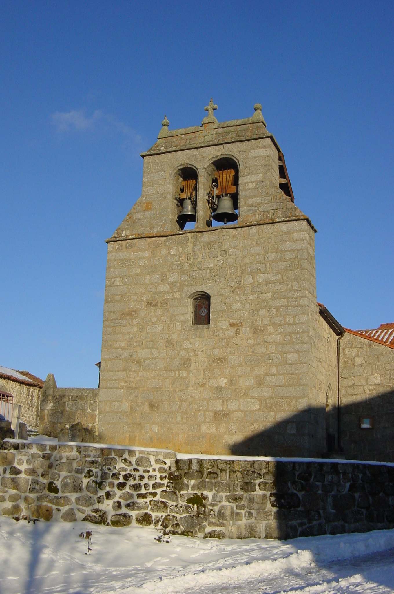 village